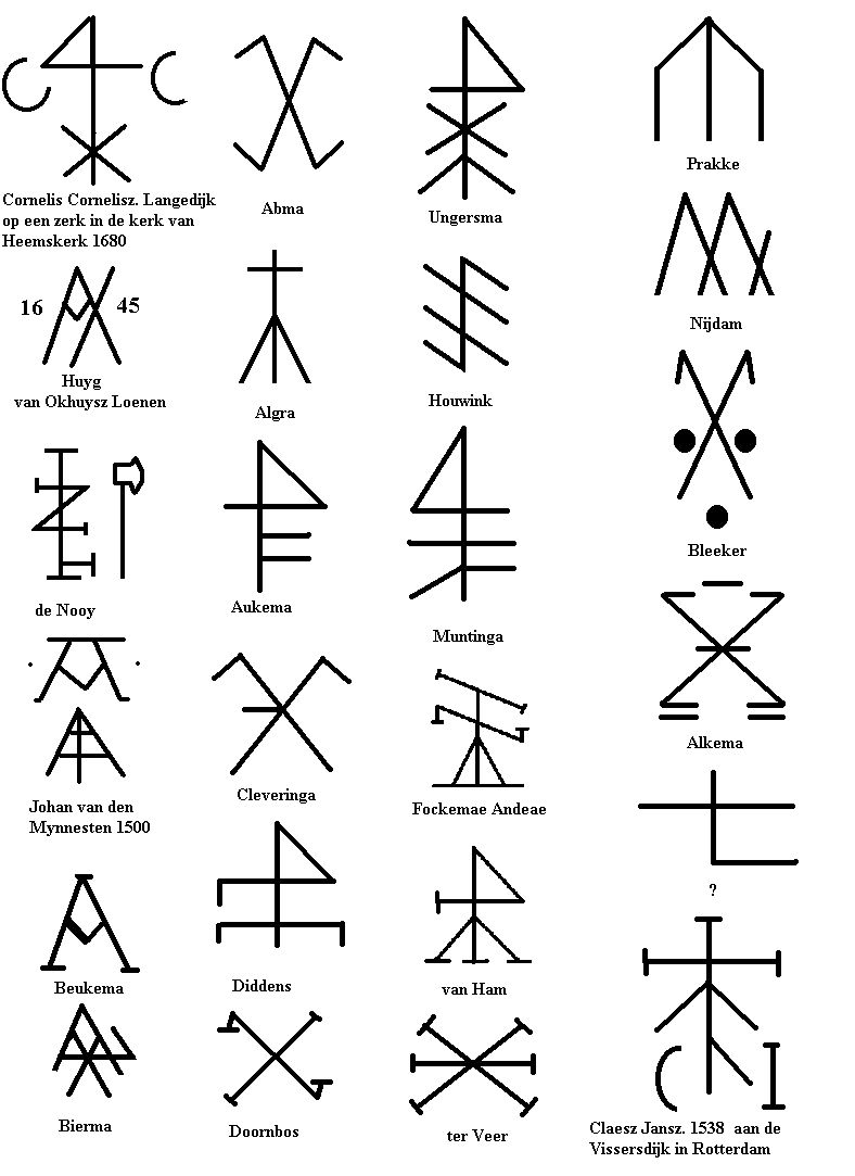 Eigen tekening van diverse huismerken Robert Prummel 2007 Own drawing